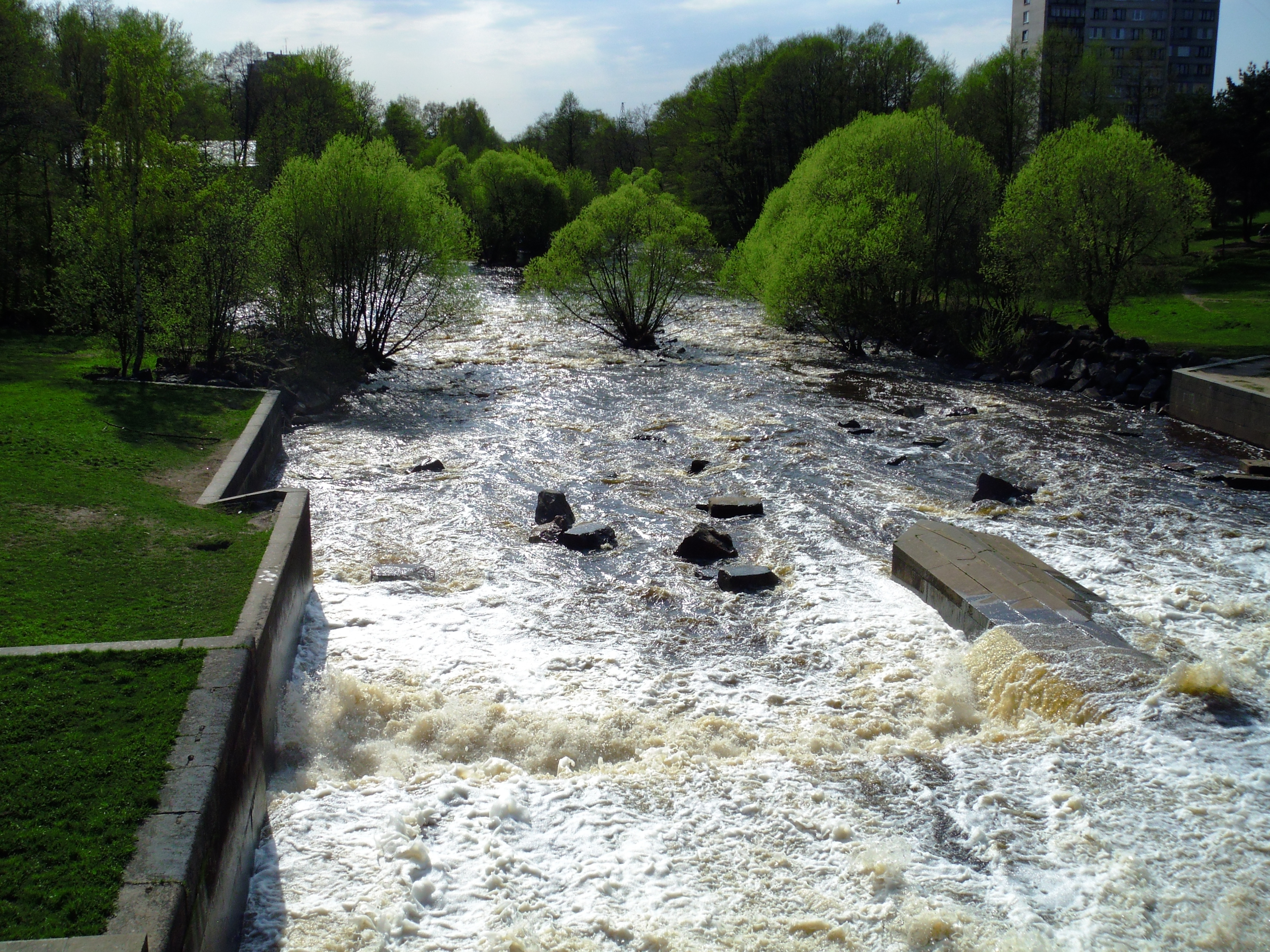 СПб. Сестрорецкий Разлив. Вид с плотины "Перепада" (Гаусмана).